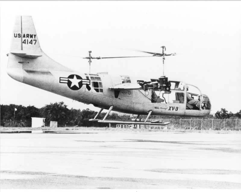 Bell XV-3